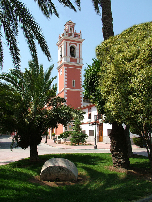 Ref.0109,iglesia de Picanya